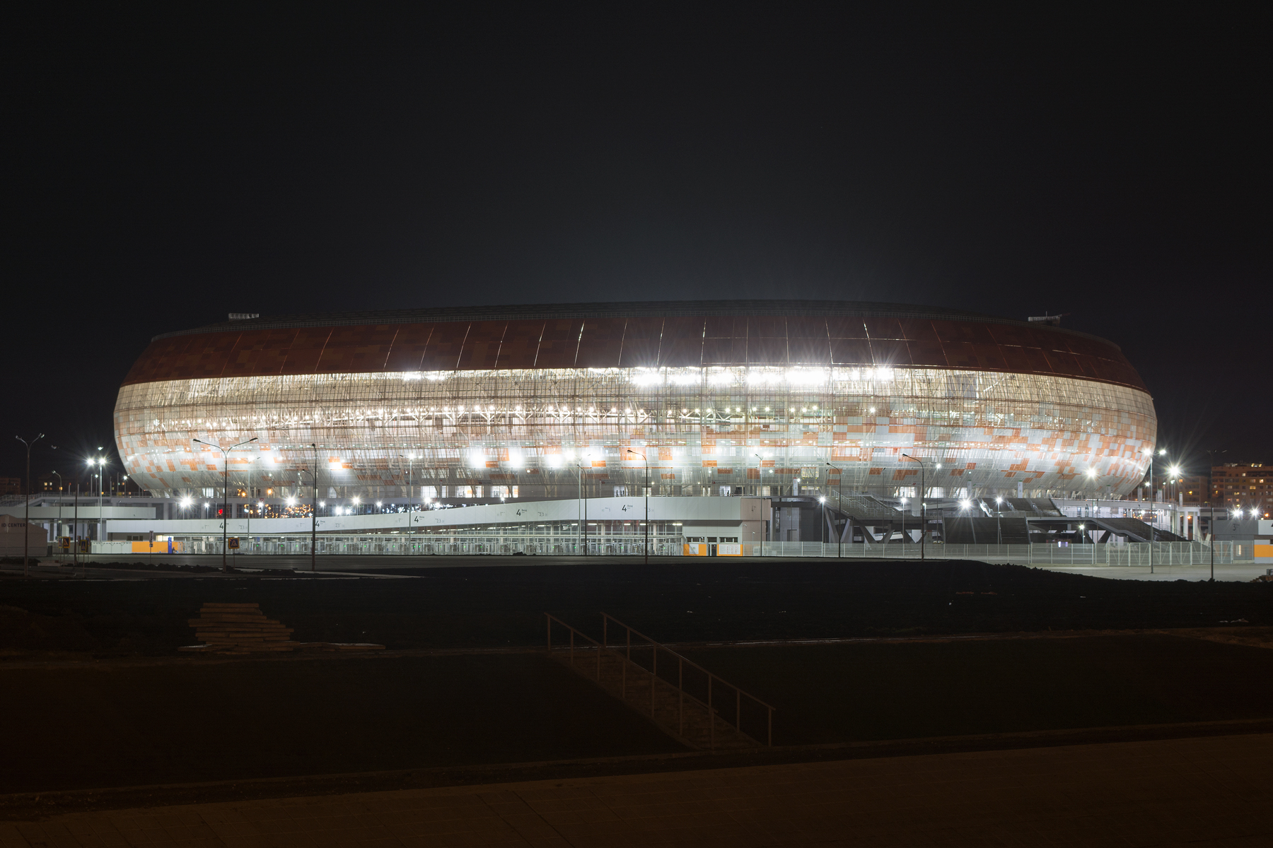 Stadium Mordovia Arena at night